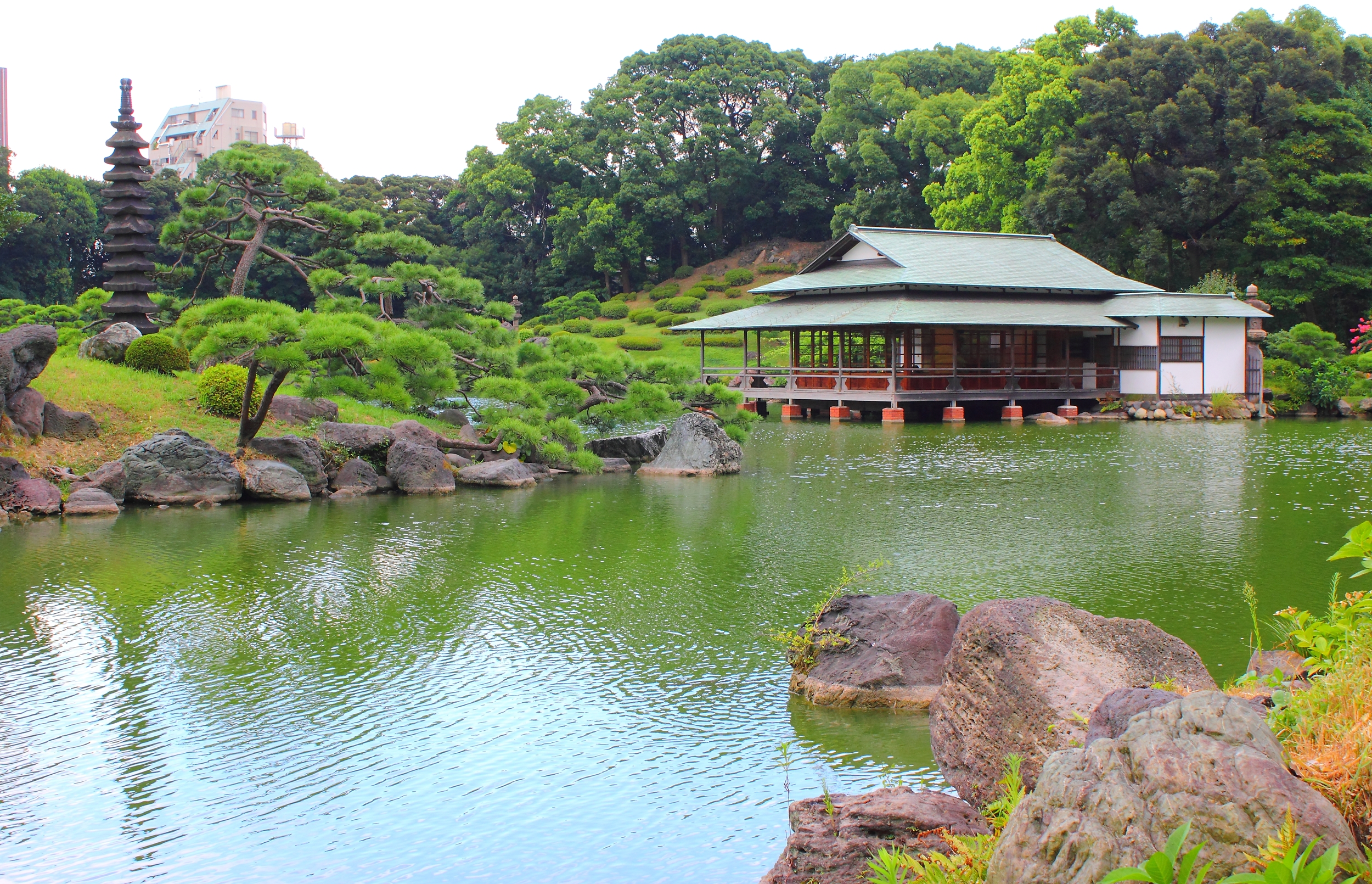 清澄庭園（東京都江東区）